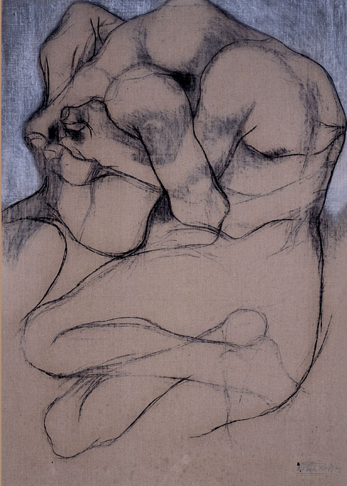 Œuvre d'Alain Ghertman, peintre et illustrateur